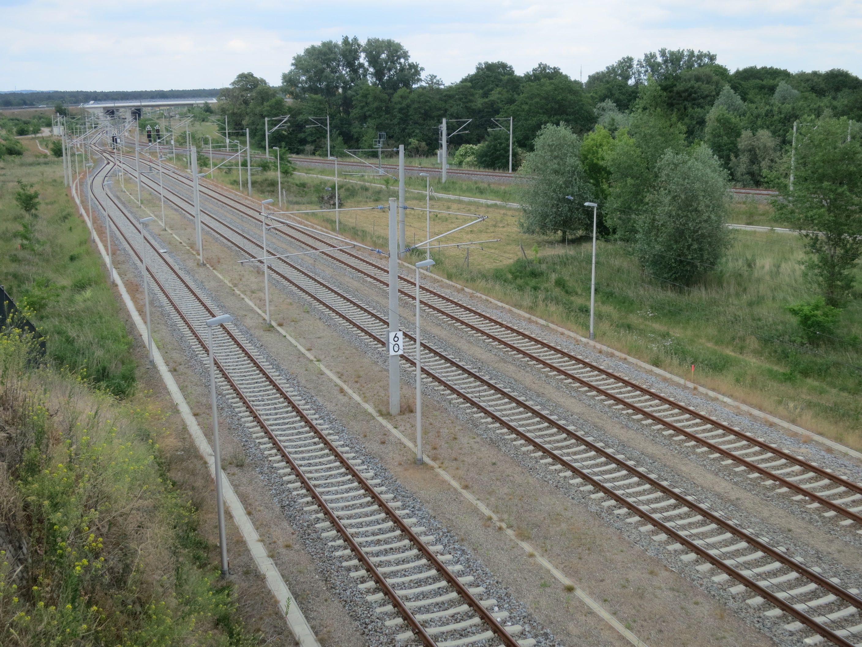 Fernbahnstrecke zum Flughafen BER, Abzw. Diepensee Cargo. Vordergrund: Gütergleise zum Flughafen, Hintergrund: Fernbahngleise zum Personenbahnhof des Flughafens